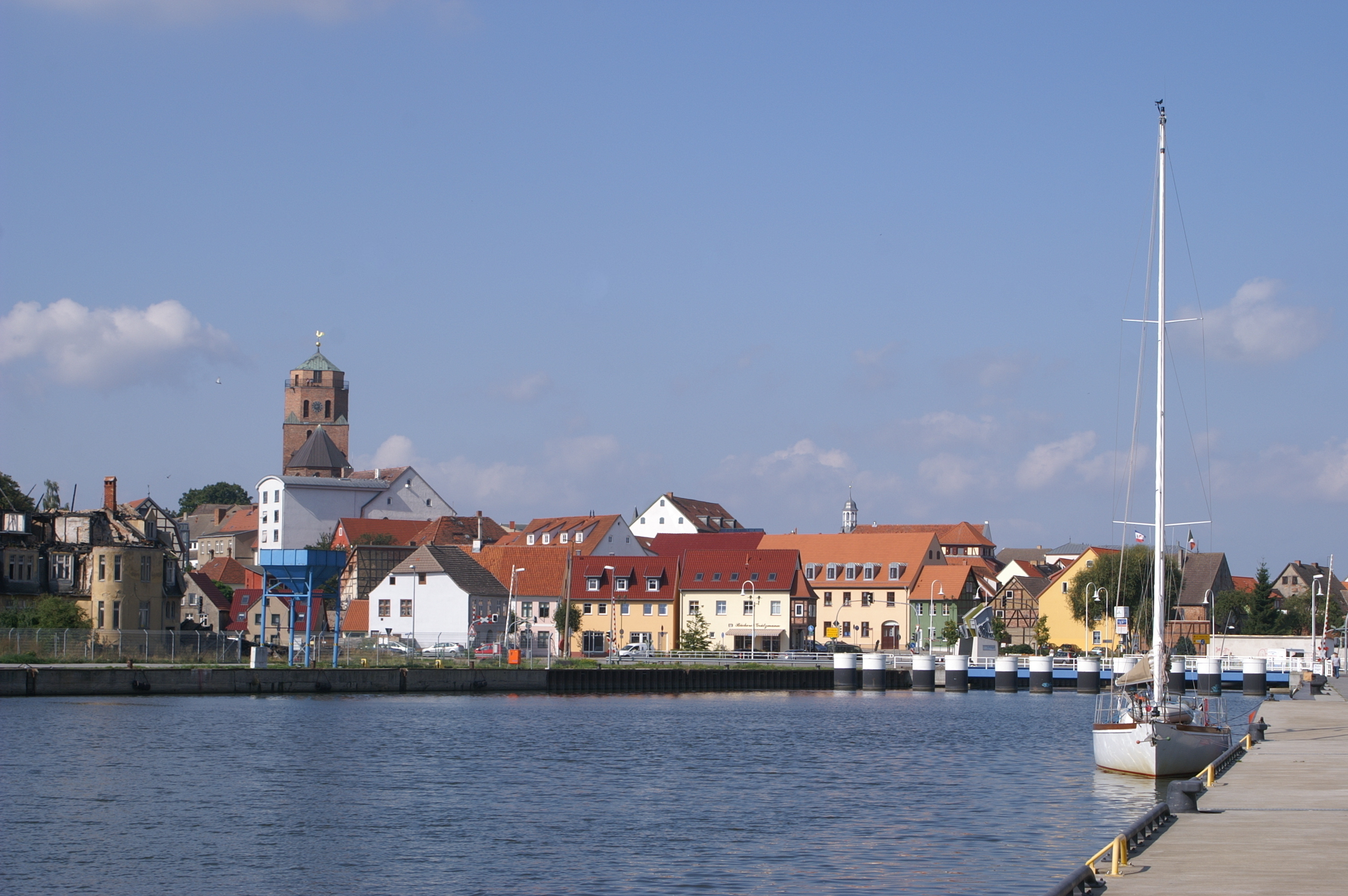 Wolgast, Hafen, Blick von der Schlossinsel zur Altstadt